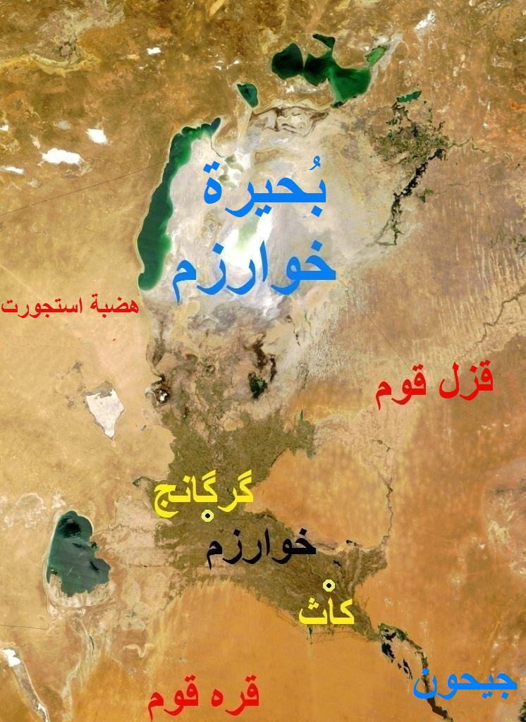 خوارزم وما يُحيط بها من معالم وبِلاد.